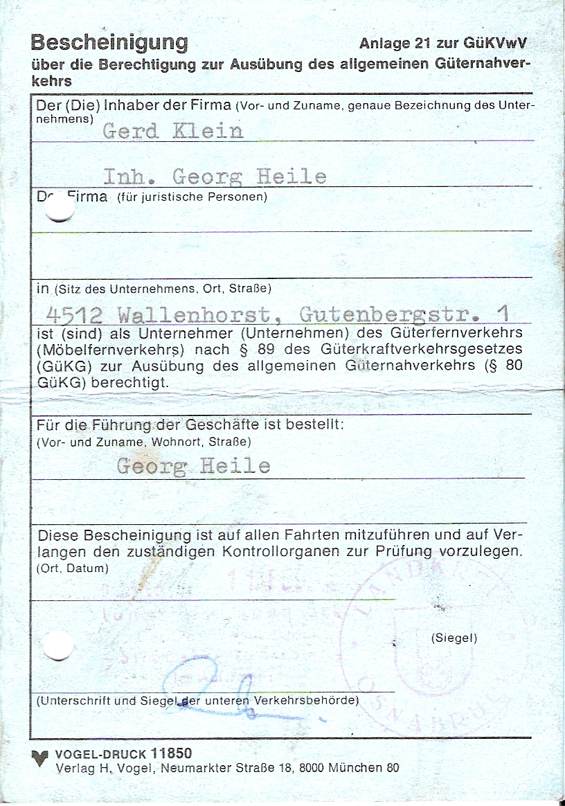 Bescheinigung der Güternahverkehr- Genehmigung ~ 1989